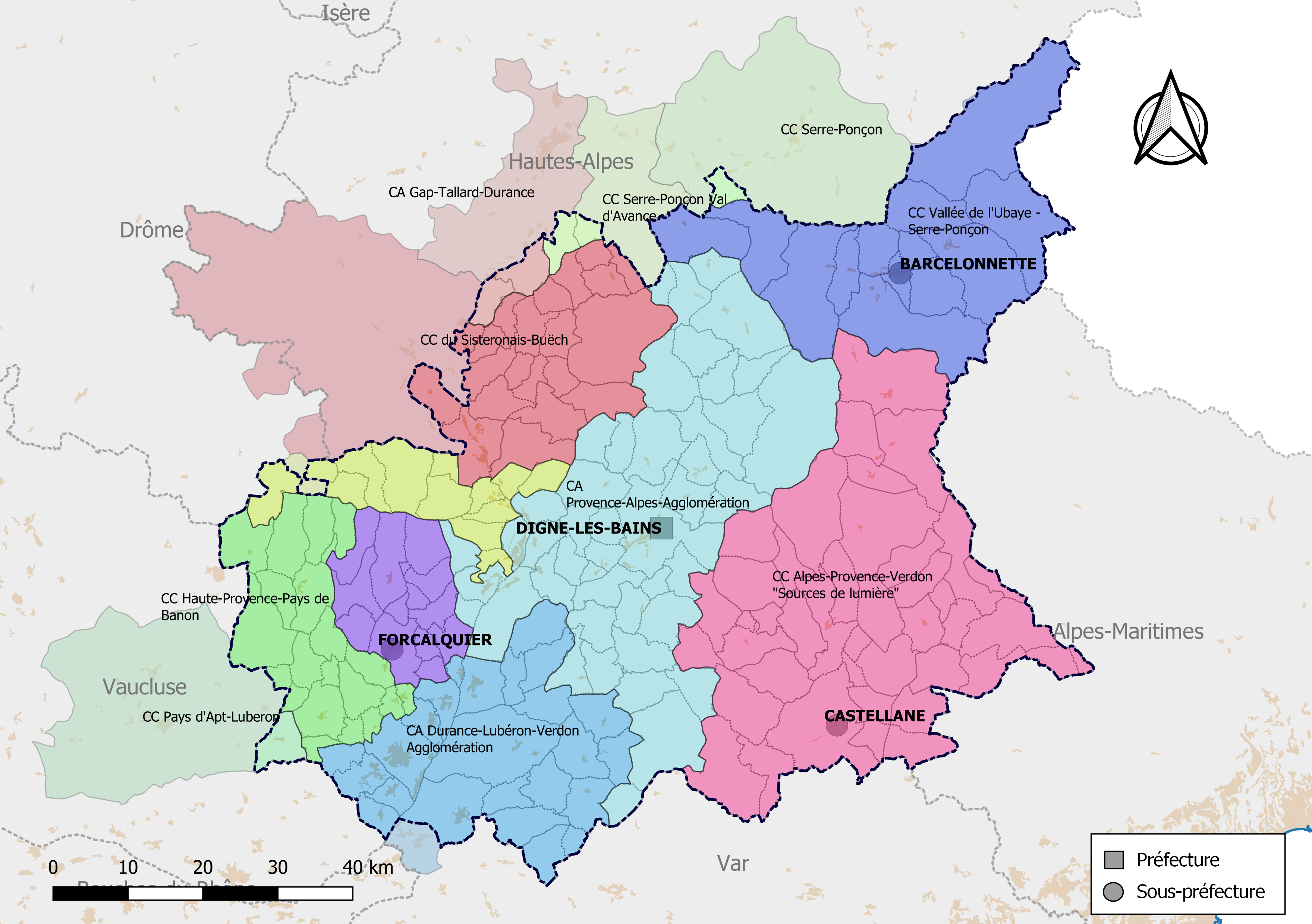 Carte des intercommunalités du département des Alpes-de-Haute-Provence, France. Composition au 1er janvier 2019